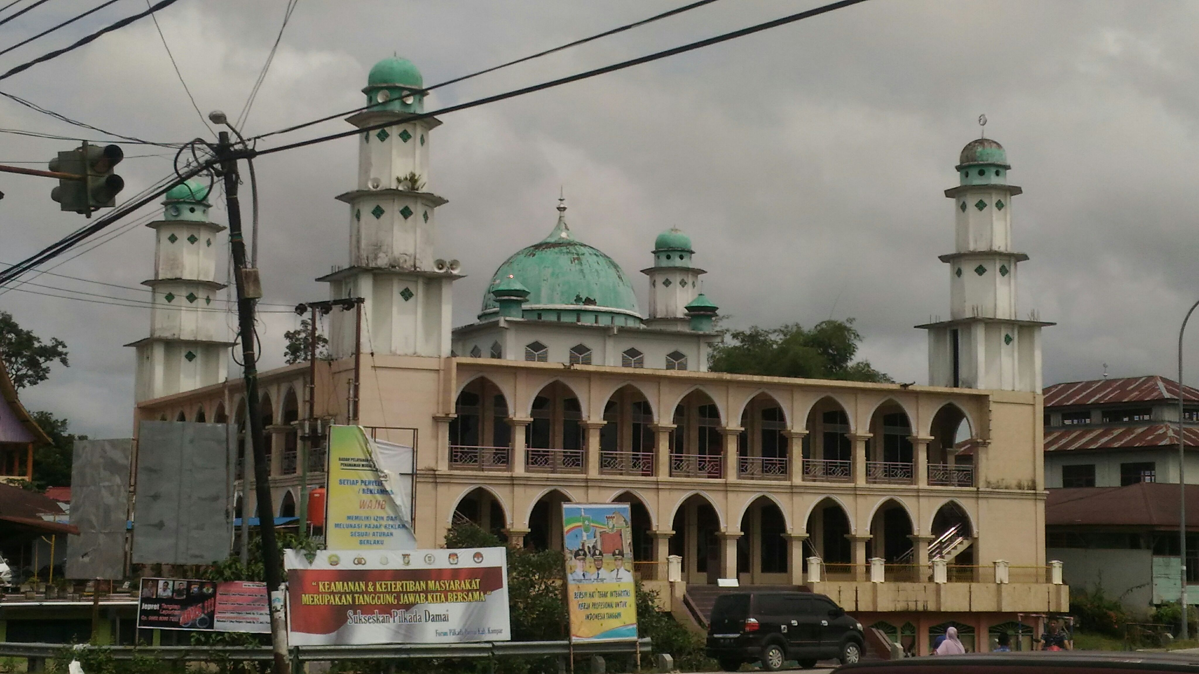 Suasana di Pasar Kuok, Kecamatan Salo, Kabupaten Kampar, Riau.